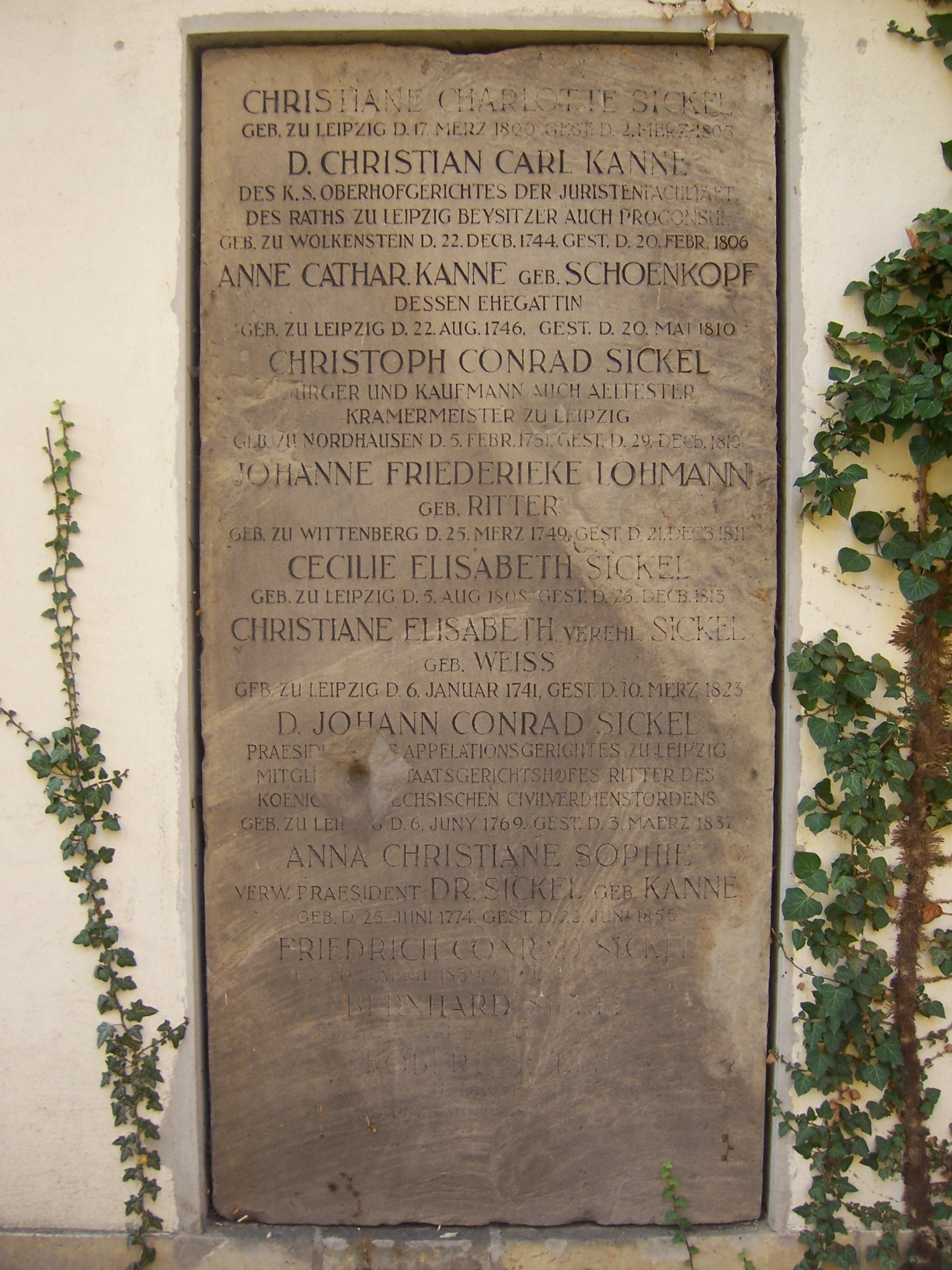 Grabplatte der Familien Kanne und Sickel